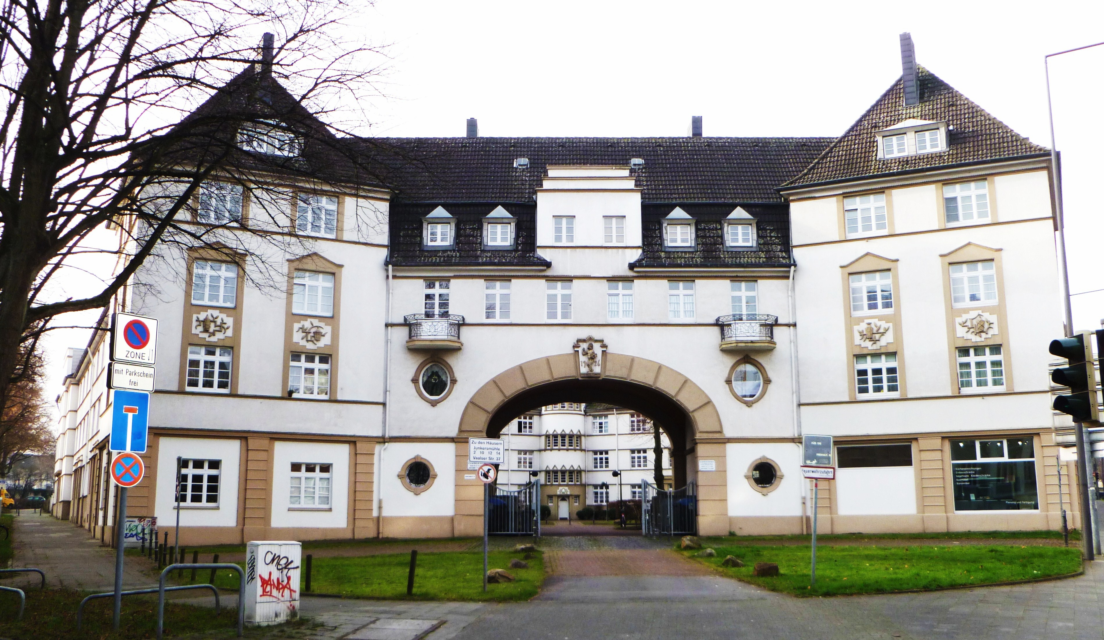 Baudenkmal in Aachen-Mitte